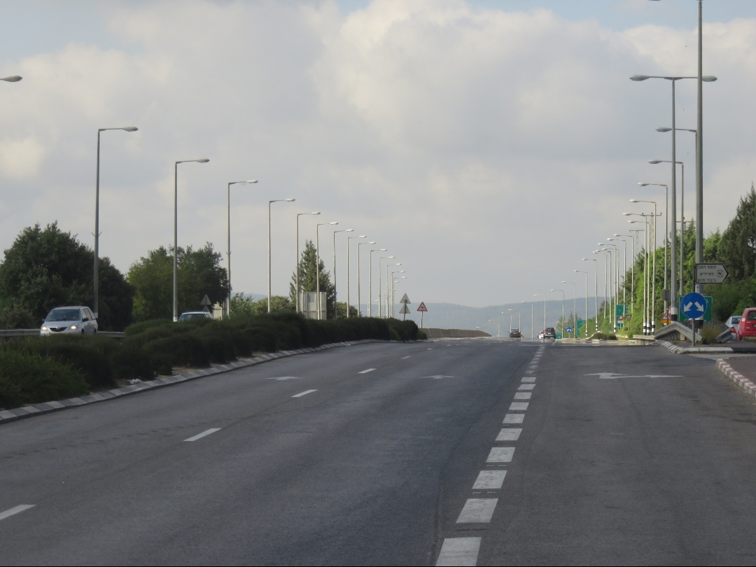 צומת השומרים כביש 722